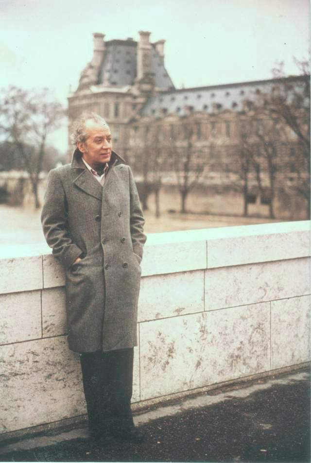 El poeta venezolano Juan Sánchez Peláez en París, Francia.